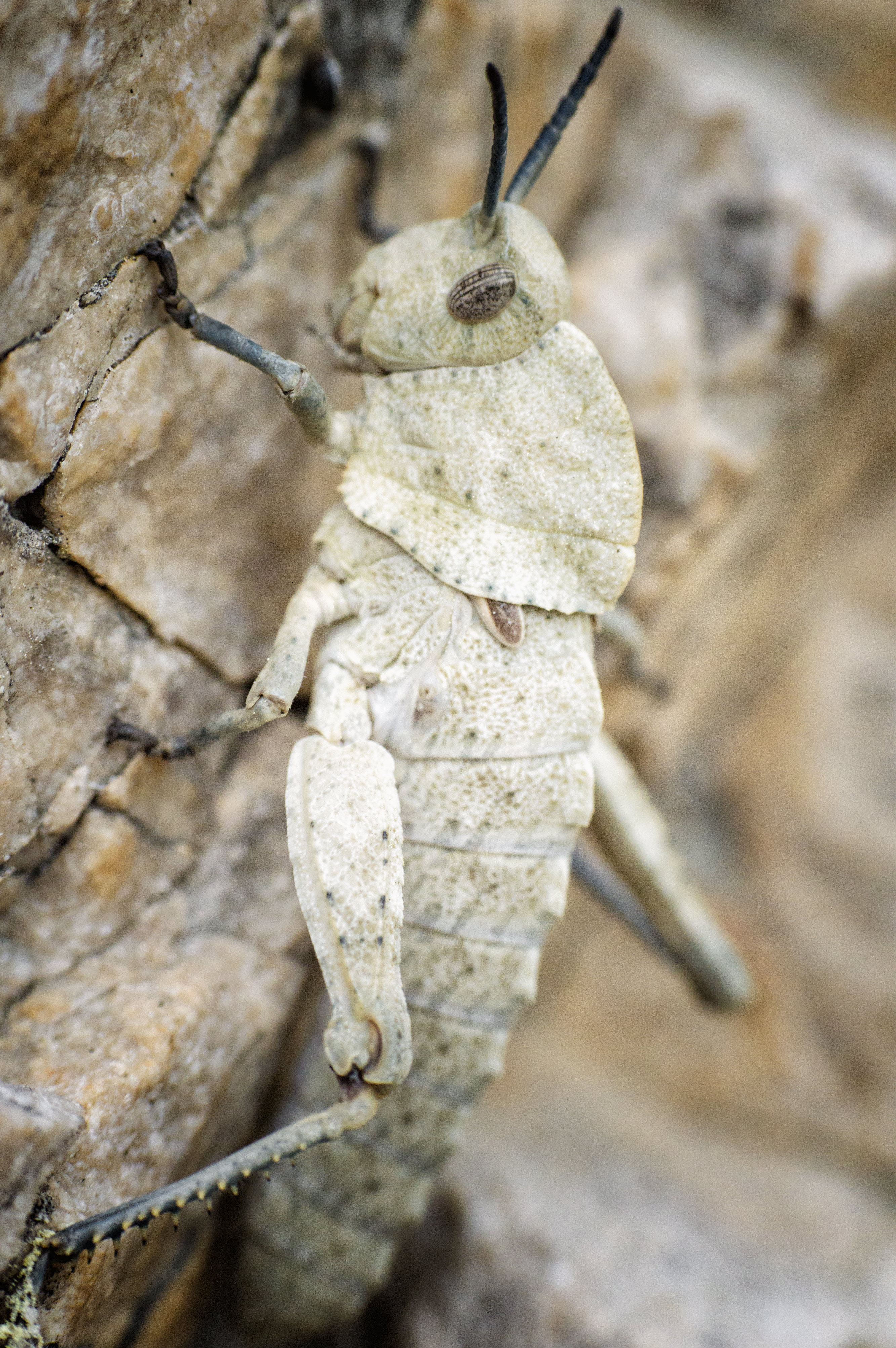 Saltamontes o Caelifera de un aspecto algo extraño en su color y sin alas